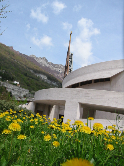 Autore: Tomaso D'Incà Levis